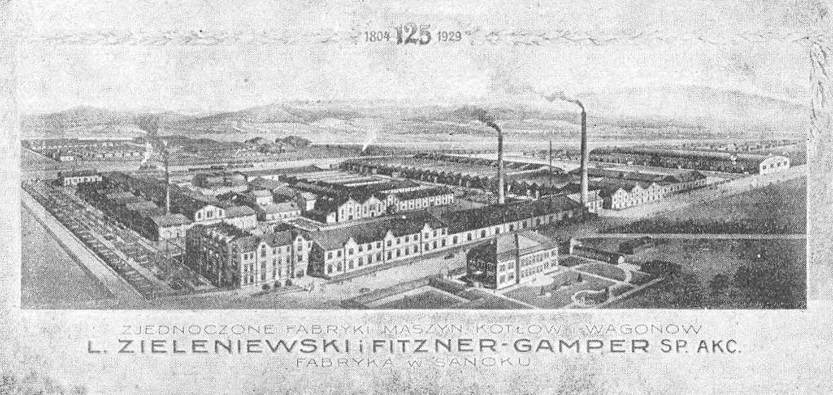 Zjednoczone Fabryki Maszyn, Kotłów i Wagonów – L. Zieleniewski i Fitzner-Gamper, Spółka Akcyjna, Fabryka Sanocka (1804-1929). Autor zdjęcia: Leon Gottdank.